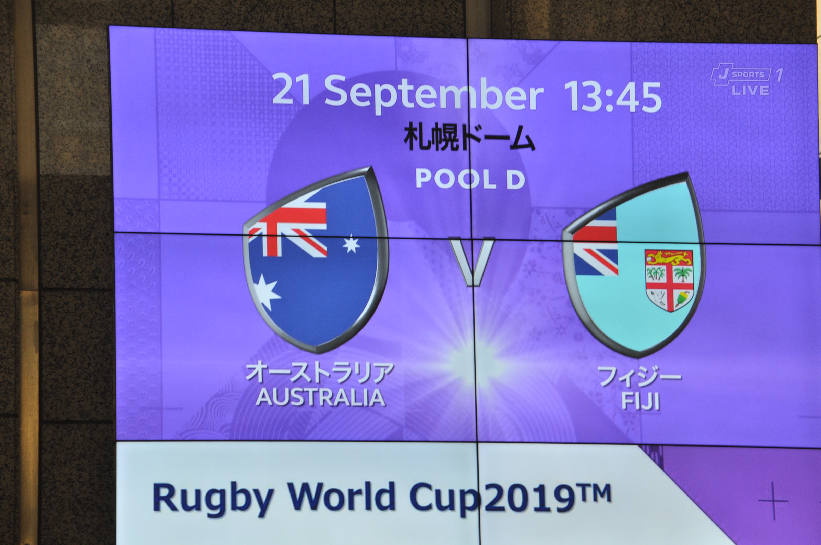 ラグビーワールドカップ2019